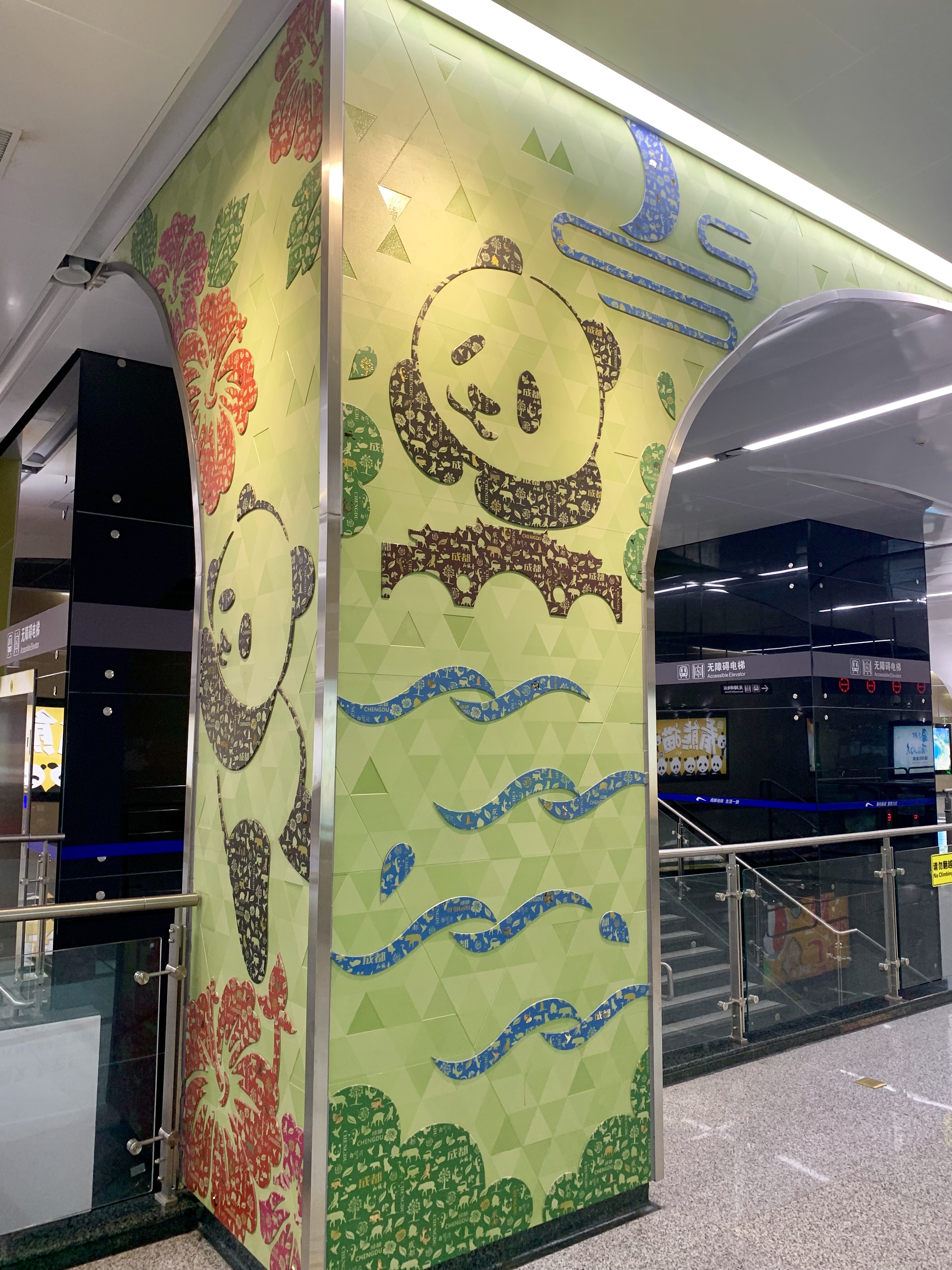 成都地铁广州路站